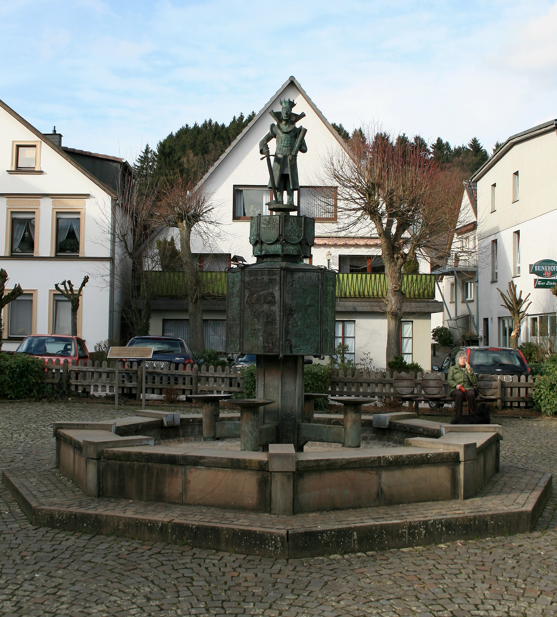 1990 durch K.-T. Neumann fertiggestellter Stadtbrunnen in Neuenrade. Der Schmuck am Brunnen zeigt Graf Engelbert III. von der Mark und 8 Tafeln mit Neuenrader Stadtgeschichte.